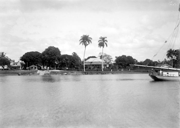 Negatief. Zicht op het Surinaamse Groningen vanaf de Saramacca rivier